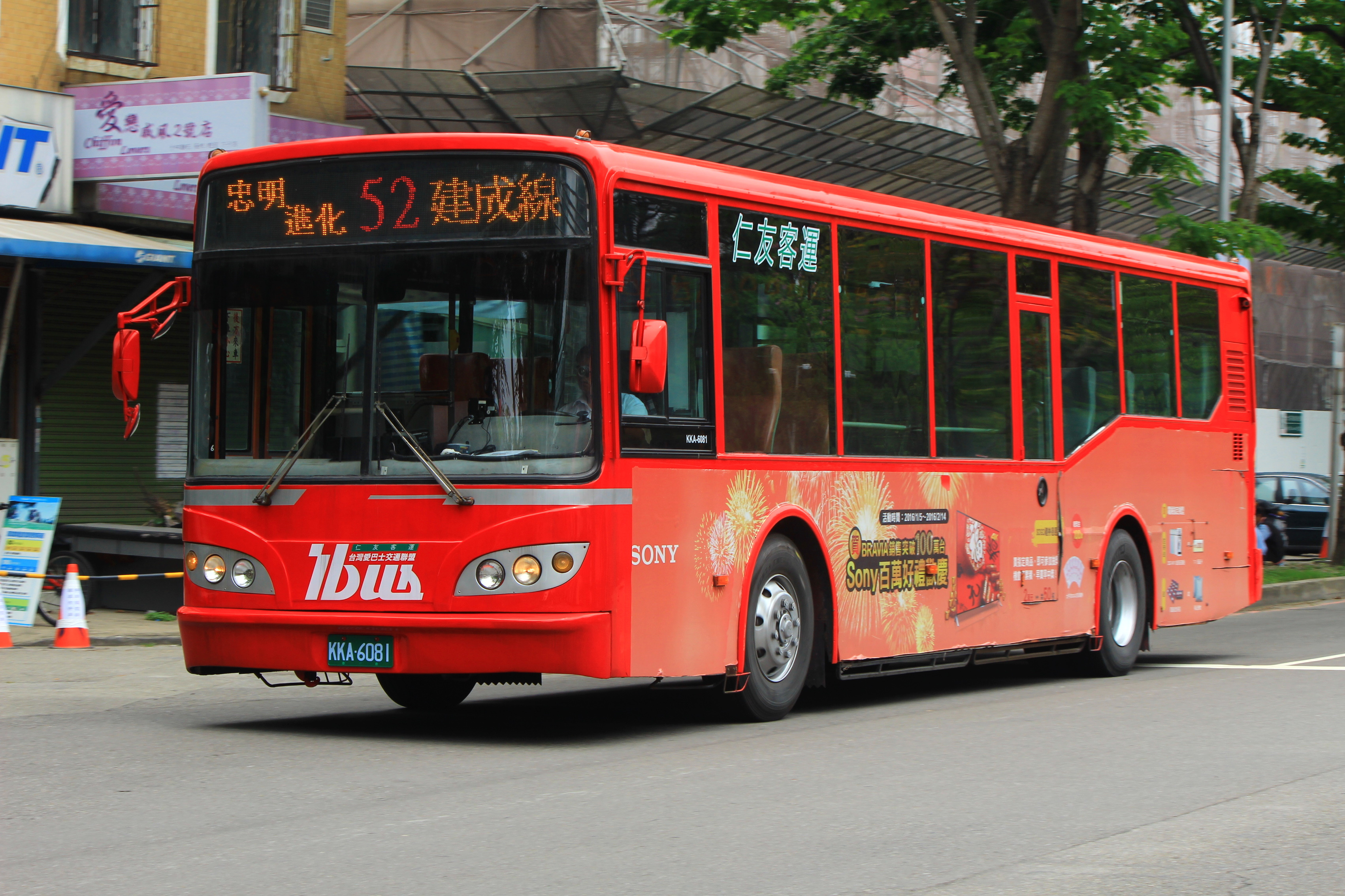 仁友客運三菱扶桑RM117NL大客車KKA-6081，為大有巴士移籍車，行駛台中市公車52路。